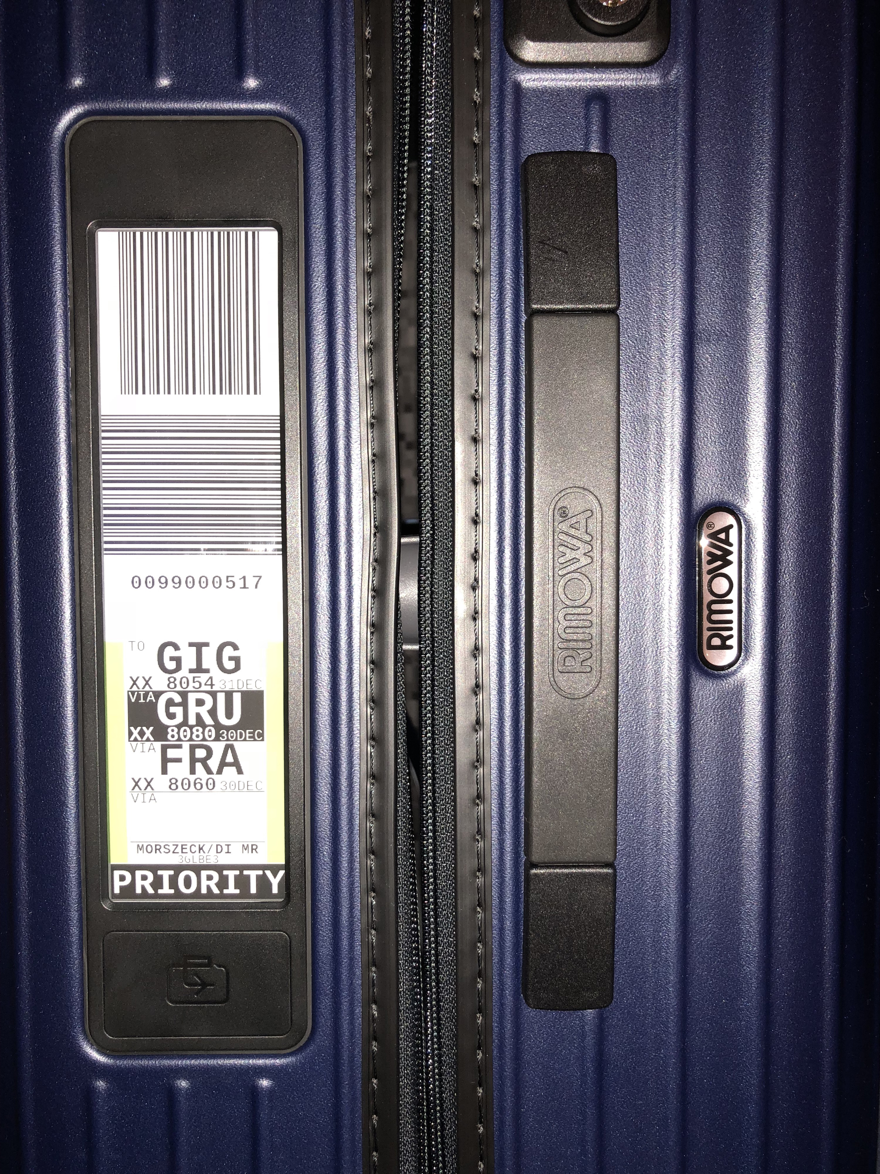 Rimowa Electronic Tag E-Ink Display auf Rimowa Salsa Multiwheel Koffer